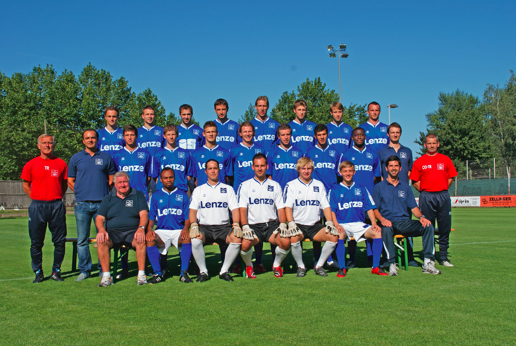 Mannschaftsfoto FC Blau Weiss Linz Saison 2009/10